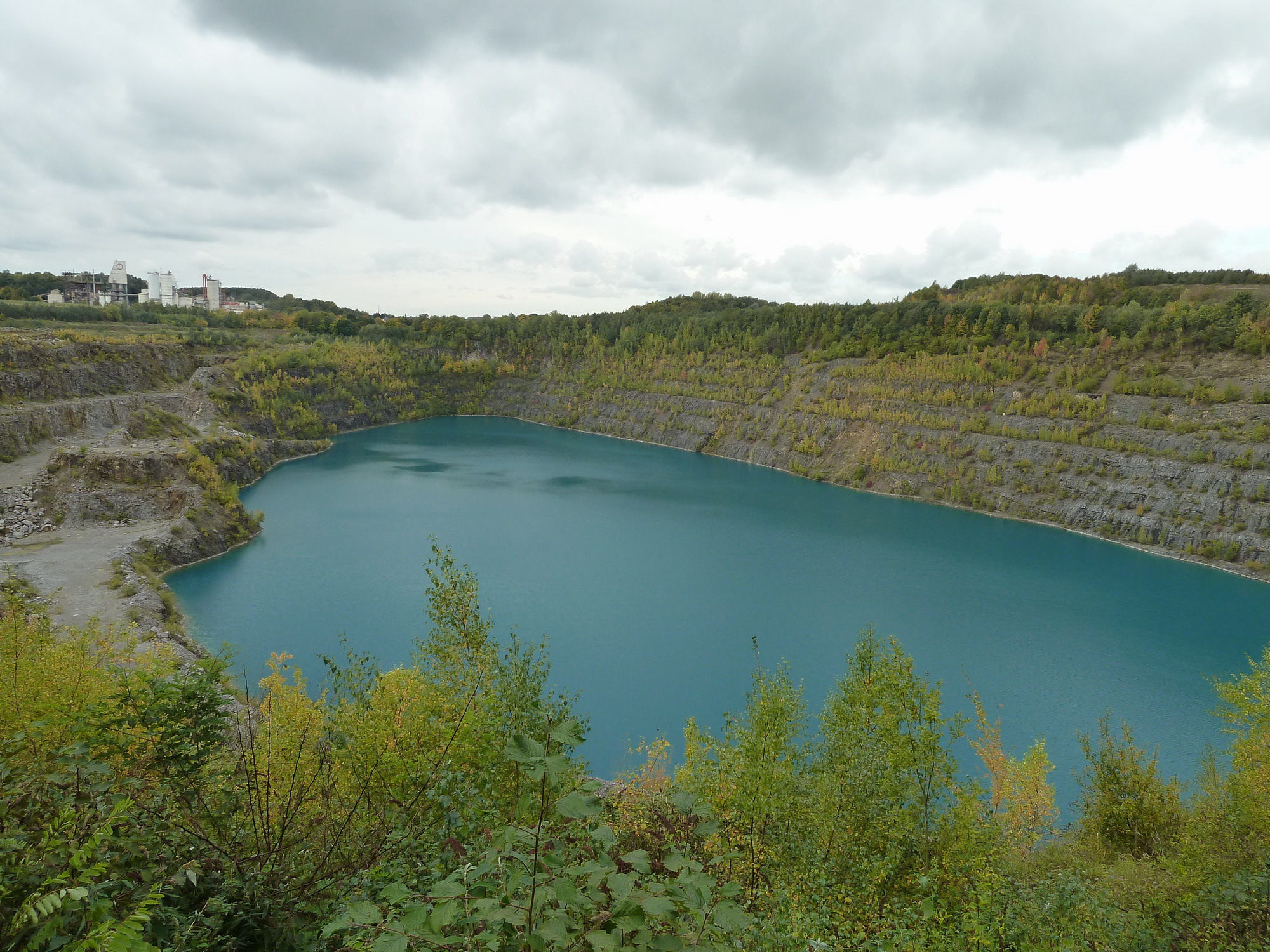 Die Gruppe Hahnenfurth (Kalkabbau) in Wuppertal-Dornap. Im Hintergrund die Kalkwerke Oetelshofen.